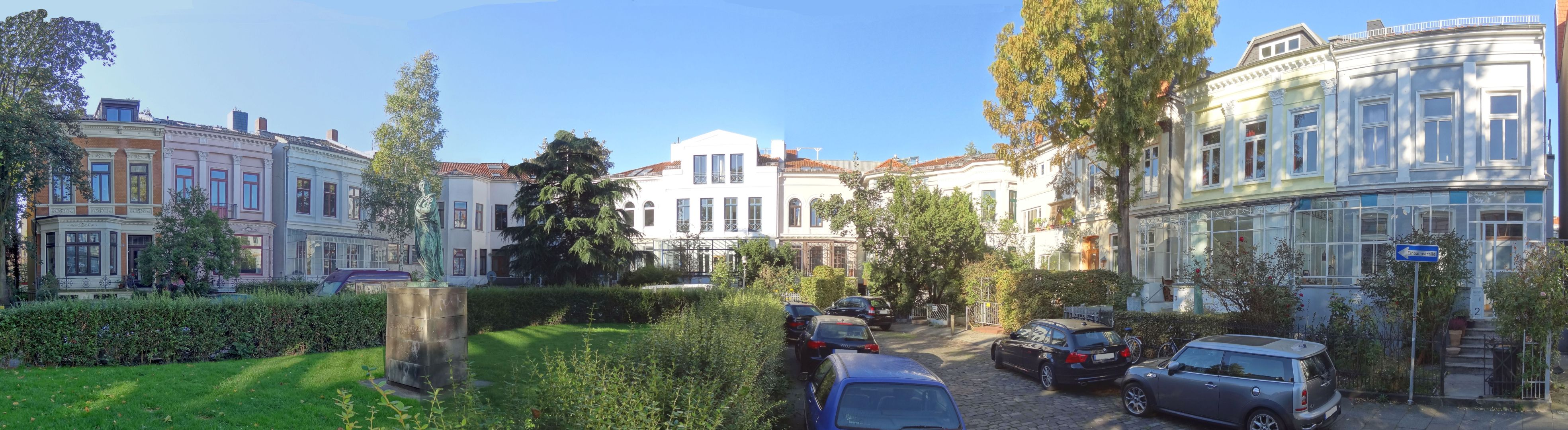 Körnerwall in Bremen, Körnerwall 16 - 2Die Denkmalgruppe ist ein geschütztes Kulturdenkmal in der Freien Hansestadt Bremen, mit der Nr. 0684 beim Landesamt für Denkmalpflege registriert.